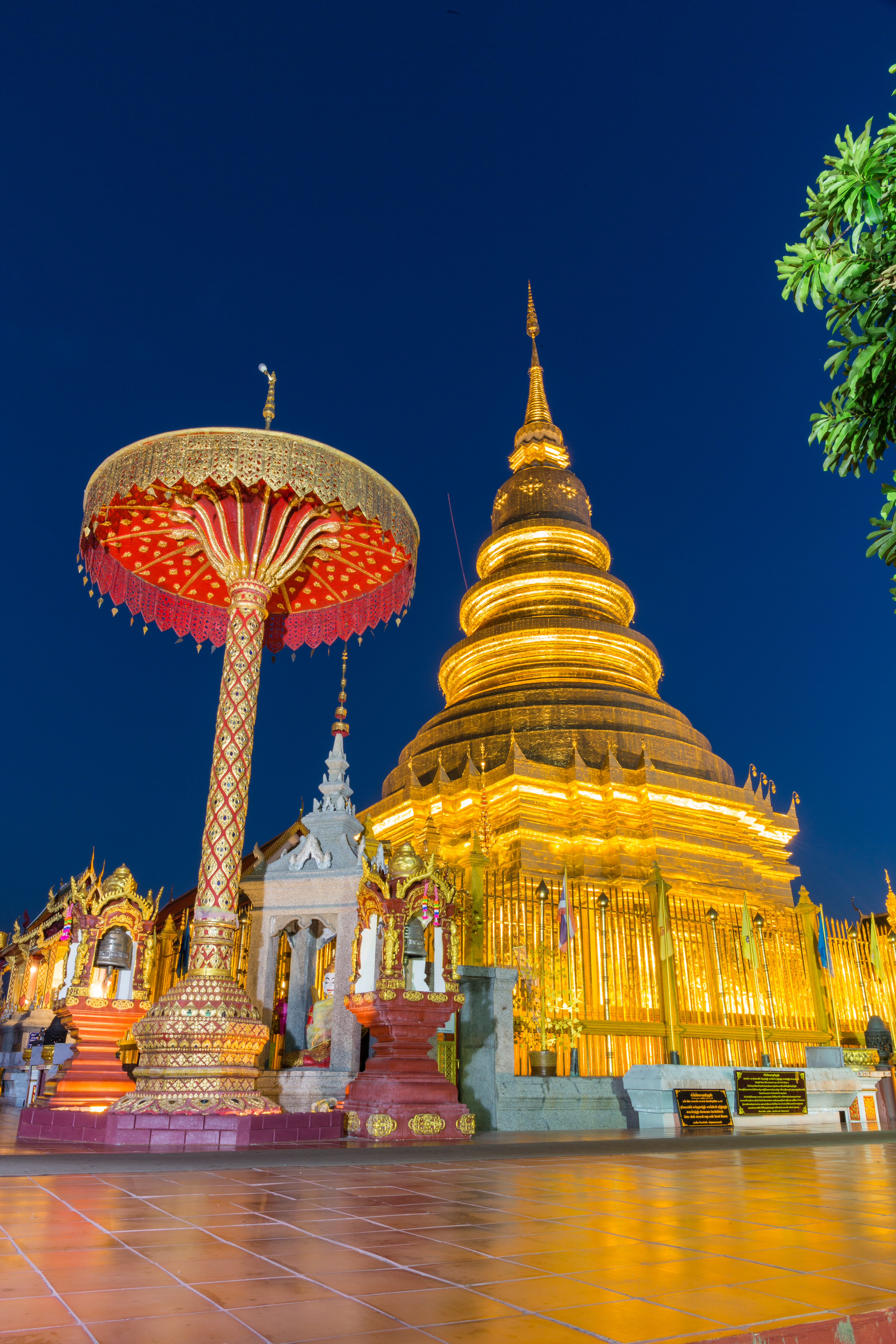 วัดพระธาตุหริภุญชัย